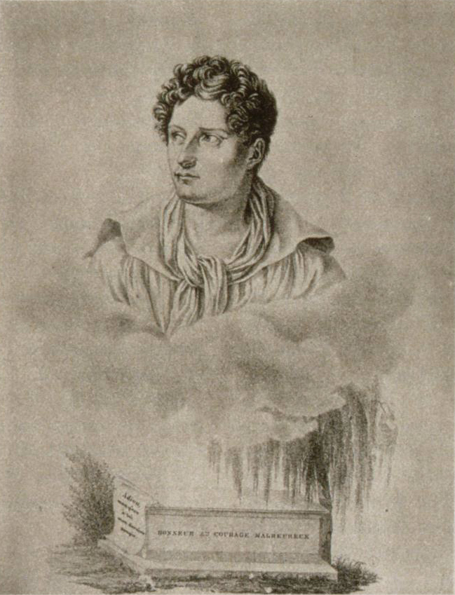 Image représentant le colonel Augustin-Joseph Caron (1774-1822), officier d'Empire et conspirateur.